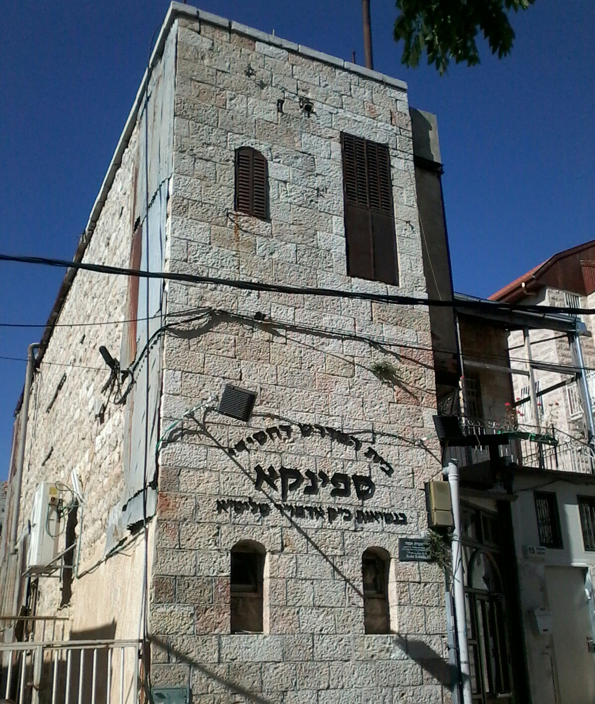 חזית בית המדרש של חסידות ספינקא בשכונת זכרון משה בירושלים